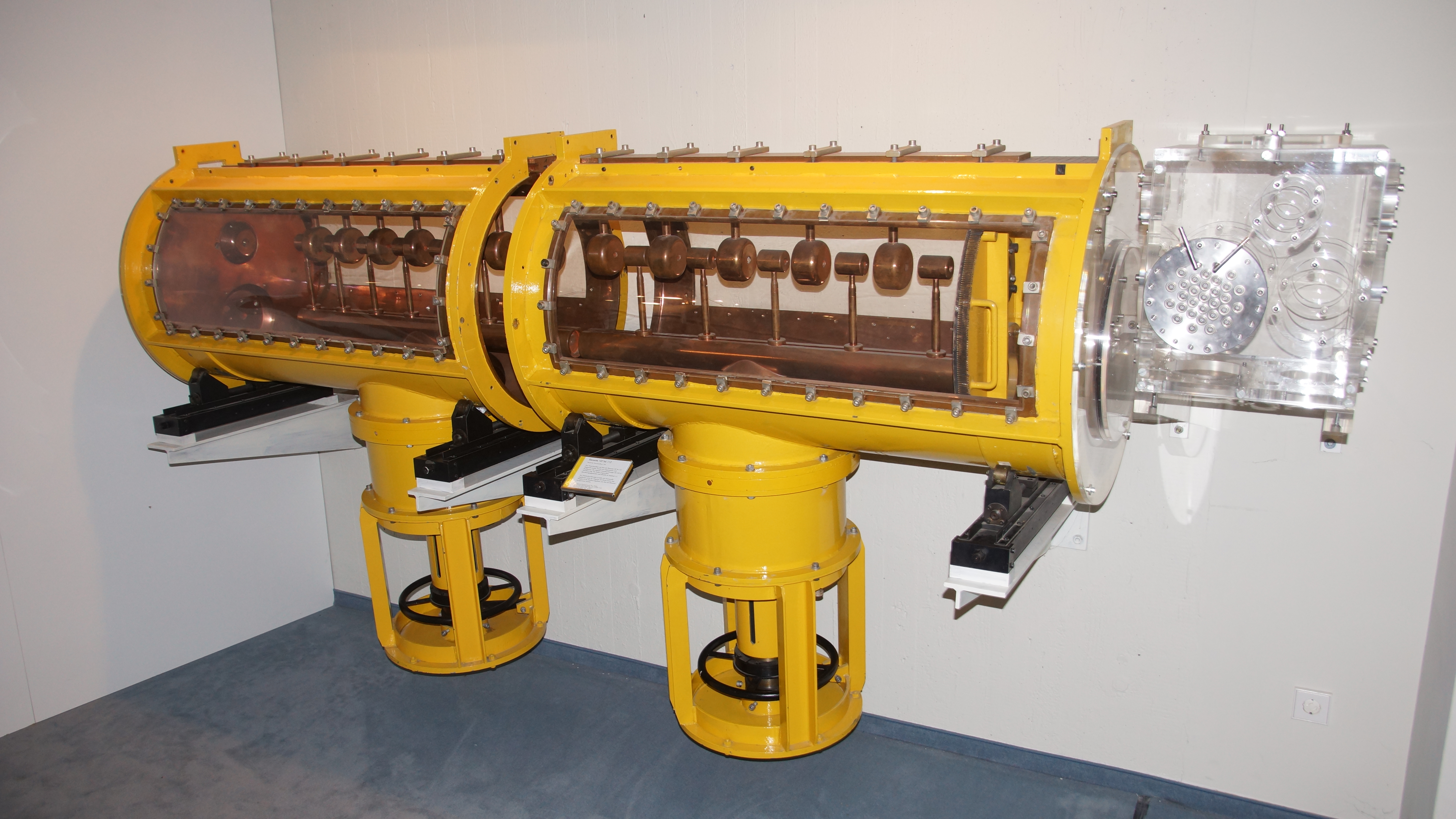 Versuchsaufbau, mit dem die Elemente 107 bis 112 hergestellt wurden im Deutschen Museum Bonn, Originalteile und Nachbauten. Am Teilchenbeschleuniger ist links eine Ionenquelle angebracht, rechts das Targetrad. Im Kasten hinter dem Plexiglas ist der Detektor eingebaut, mit dem die Elemente nachgewiesen wurden)